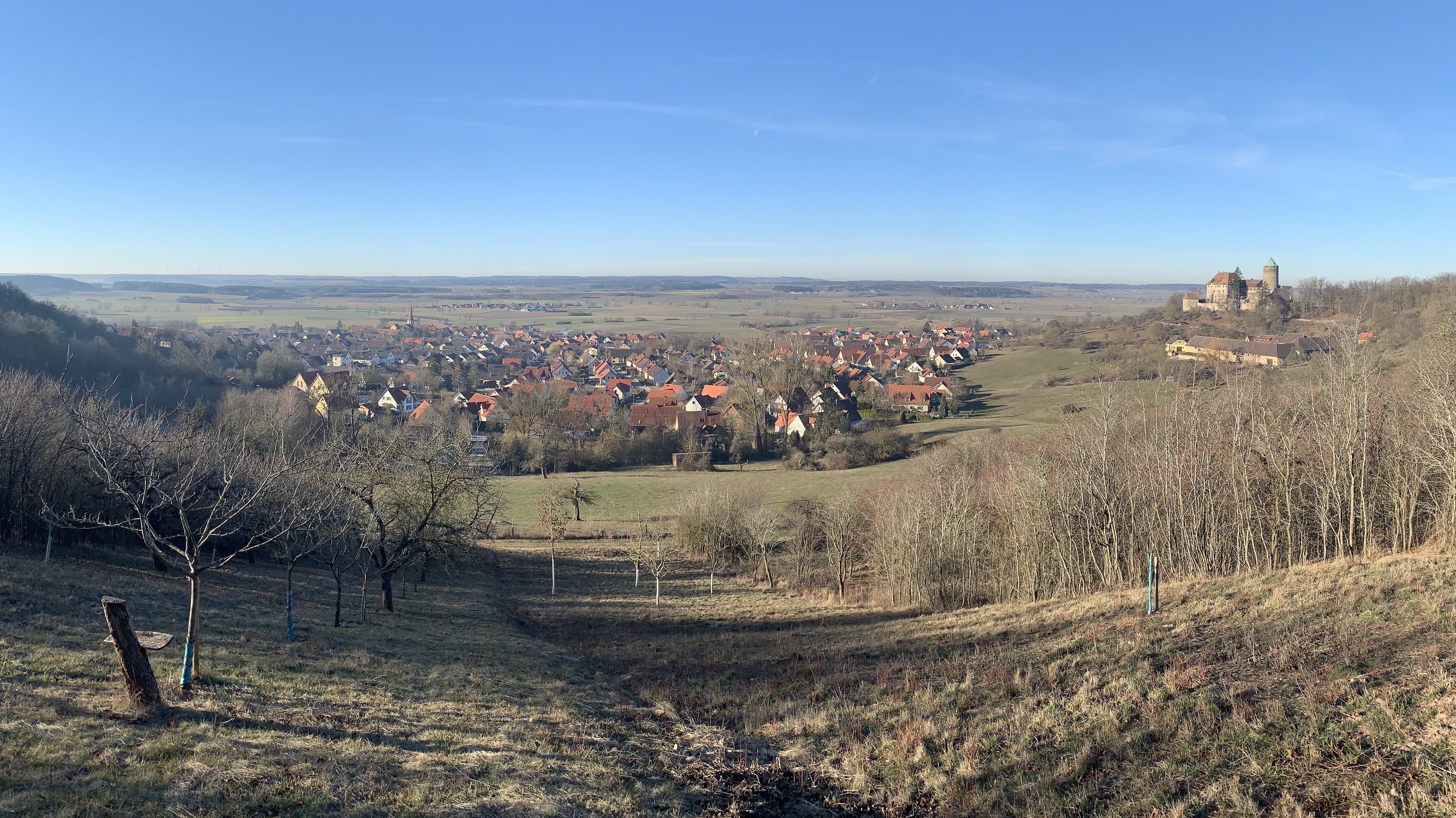 Das Foto zeigt den Markt Colmberg und die gleichnamige Burg (rechter Bildrand). das Foto wurde von der Kastanienallee oberhalb von Colmberg aufgenommen.